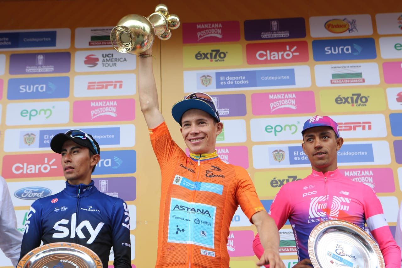 Foto del podio del Tour Colombia 2019